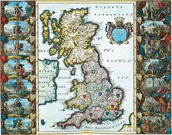 Joan Blaeu, Atlas Maior: Großbritannien